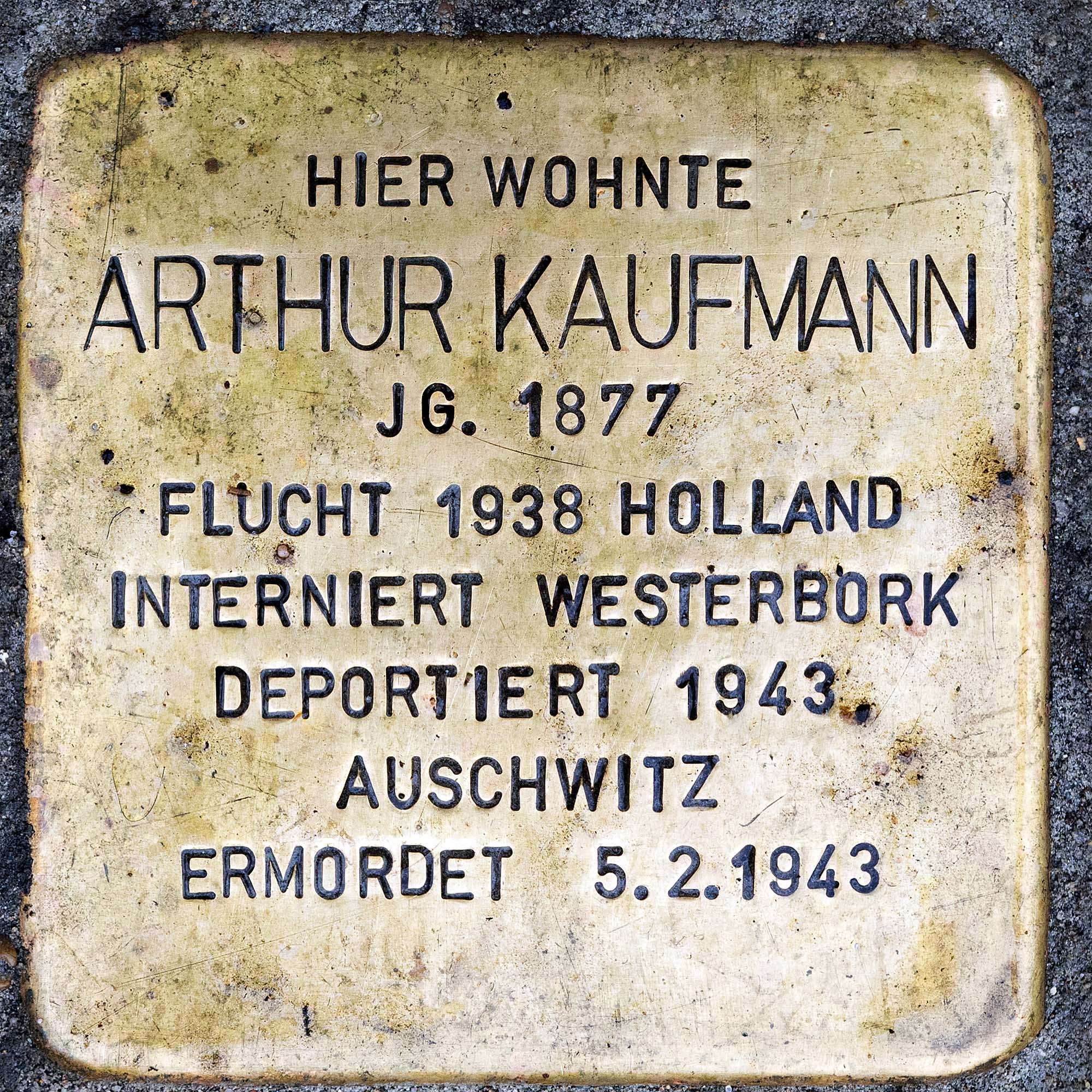 Stolperstein für Kaufmann Arthur